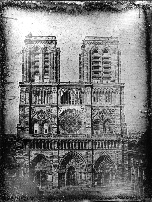 Notre-Dame-de-Paris - daguerréotype - Noël Paymal Lerebours - c. 1840. La flèche n'est pas encore reconstruite. L'image est originellement inversée.